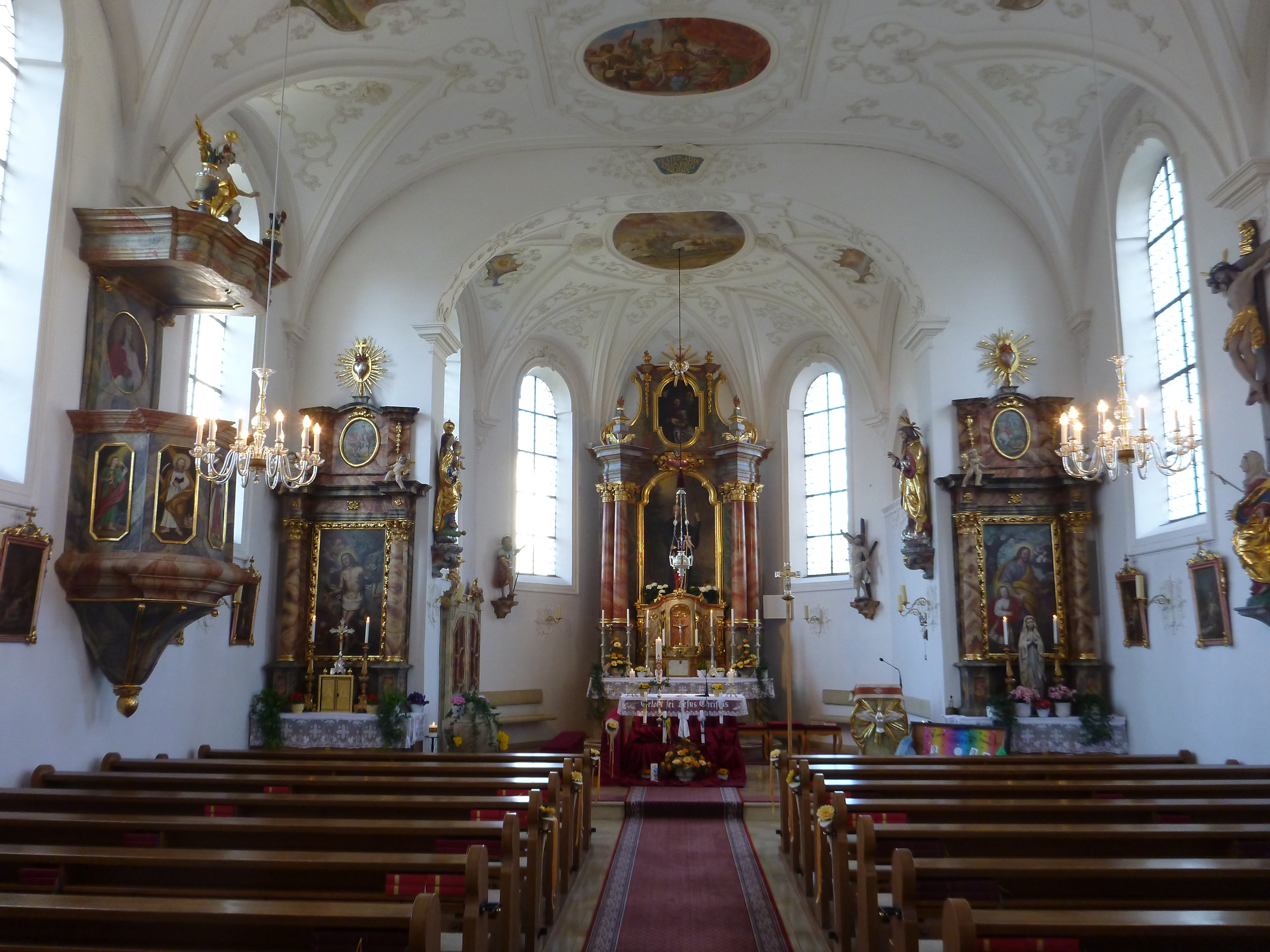 Katholische Pfarrkirche St. Leonhard Innenraum